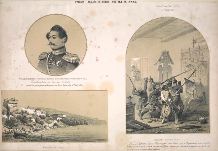 Kniaz' I. D. Orbelian; Monastyr' Russkoi na Avone; Srazhenie pri sele Chetati Tobol'skago pekhotnago polka.